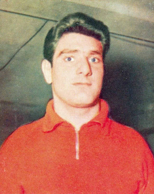 Figurina Campioni dello Sport Panini 1966 n.64 Adelmo Bulgarelli